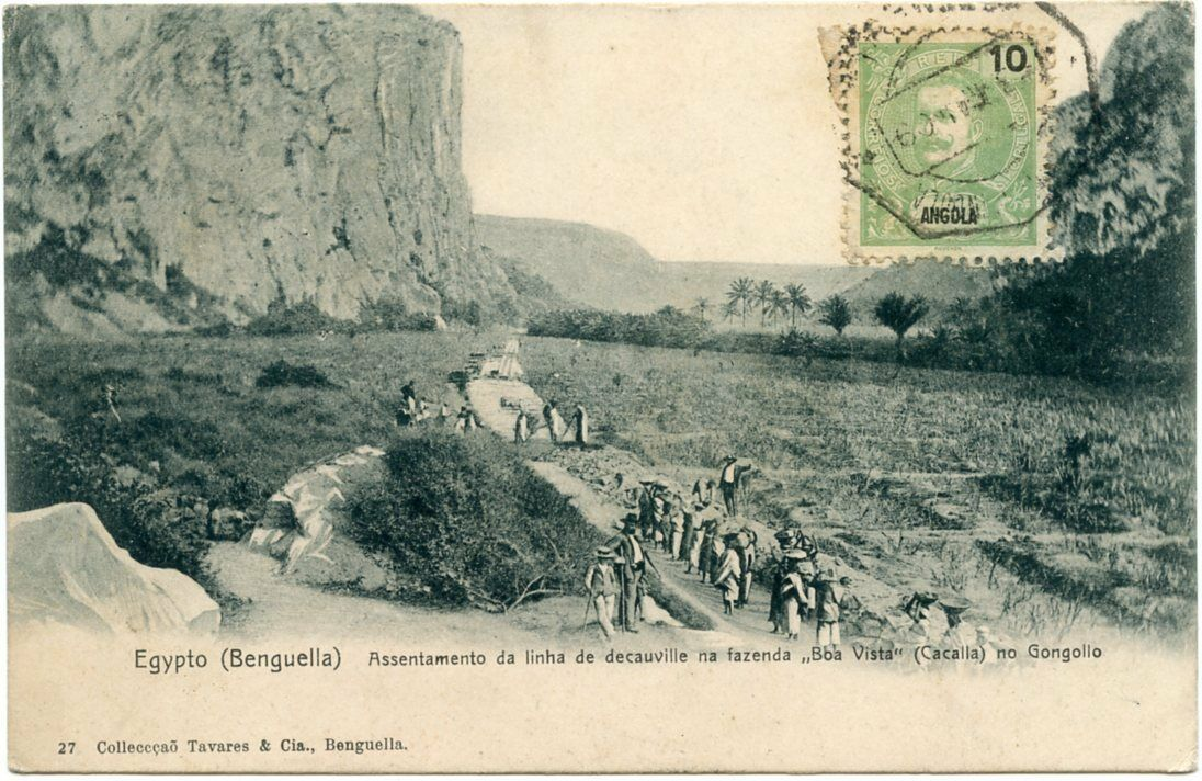 Egypto (Benguella) - Assentamento da linha de decauville na fazenda 'Boa Vista' (Cacalla) no Gongollo (Colleccao Tavares & Cie, Benguella)